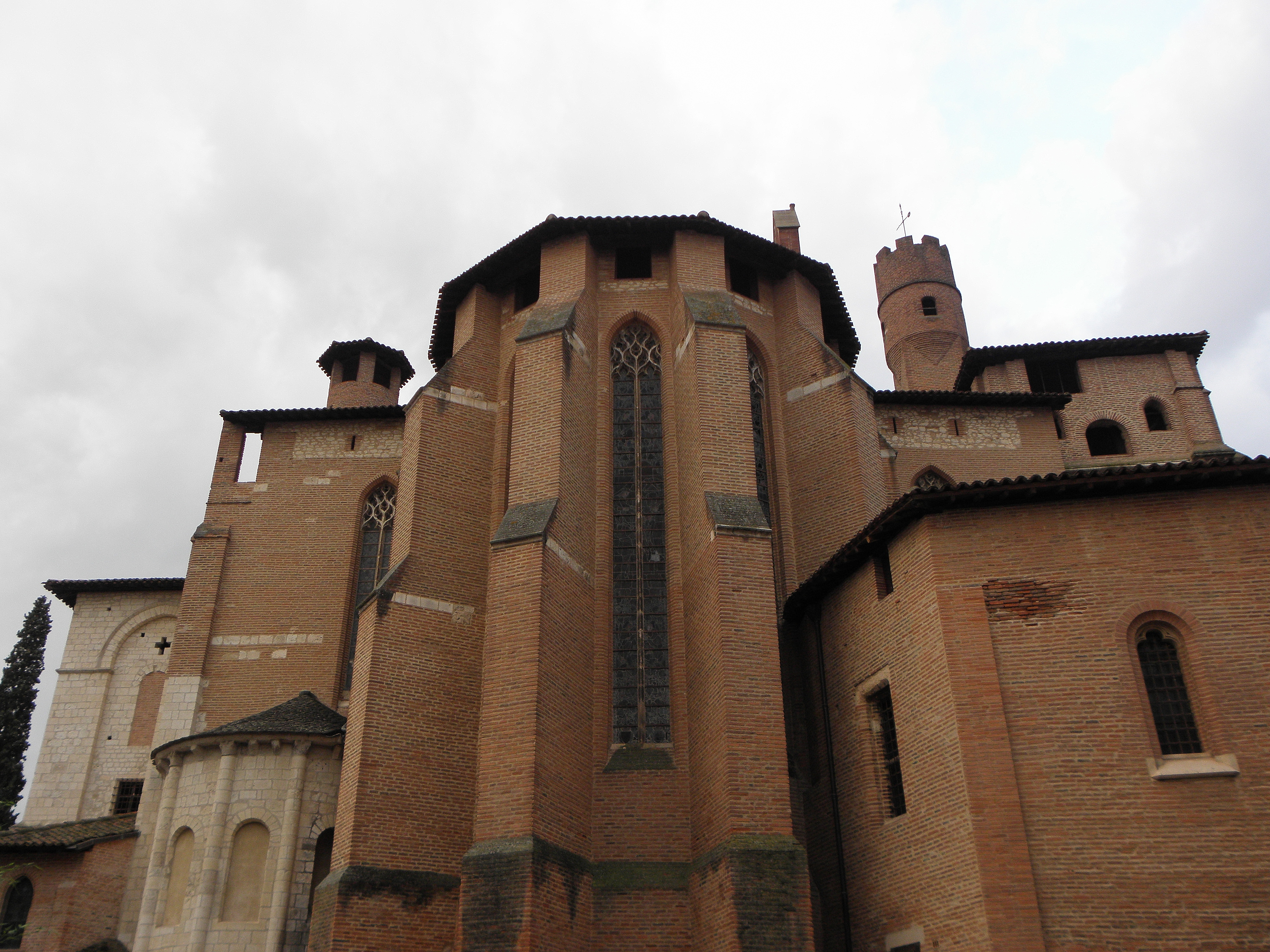 Chevet de la collégiale Saint-Salvy d'Albi (81). .